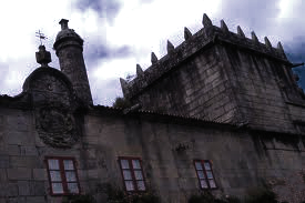 pazo de vista alegre en galicia